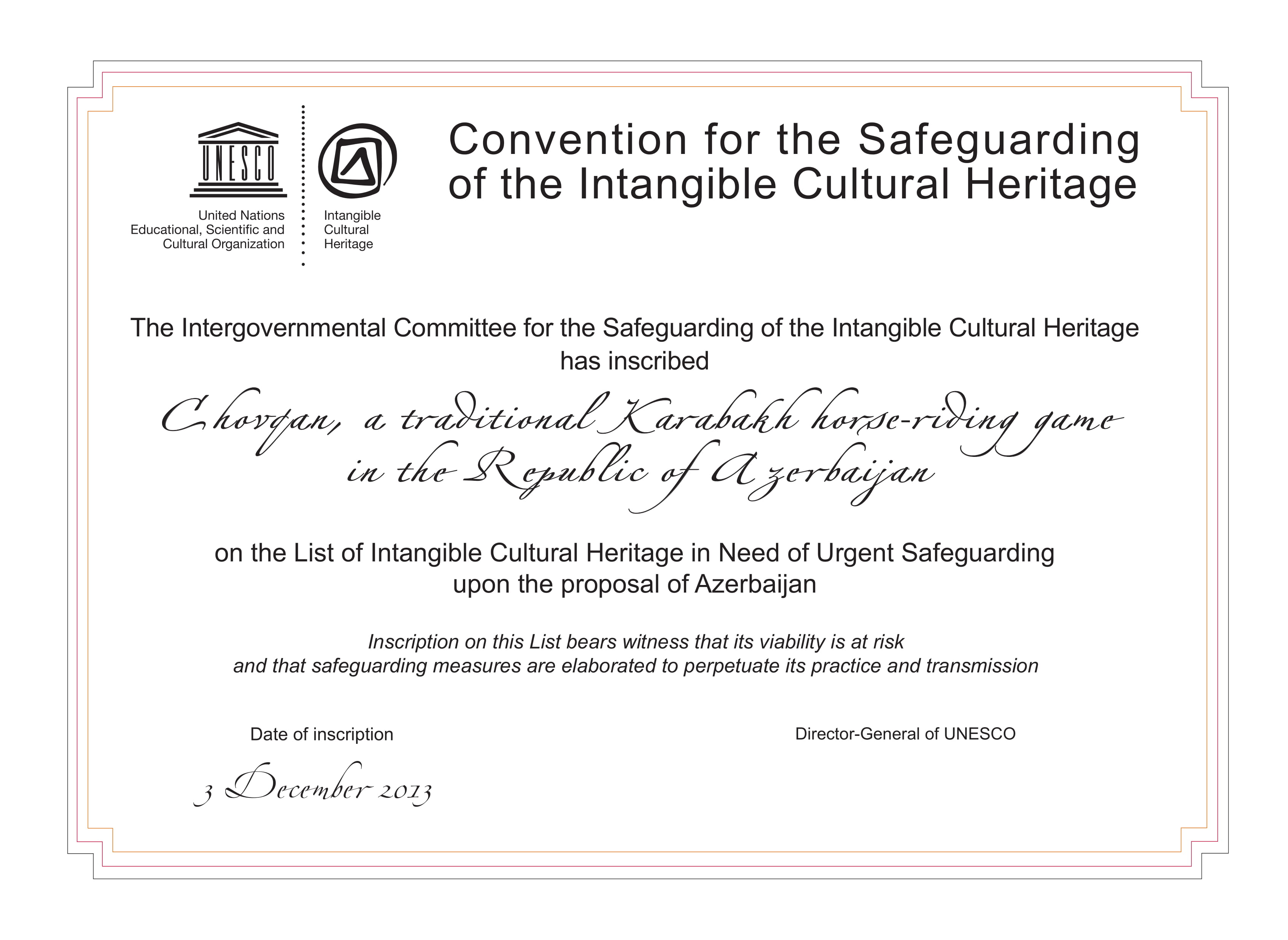 Azərbaycan Çövkən oyununun UNESCO-nun Qeyri-maddi mədəni irsinin Reprezentativ Siyahısına daxil edilməsini təsdiq edən sertifikat.